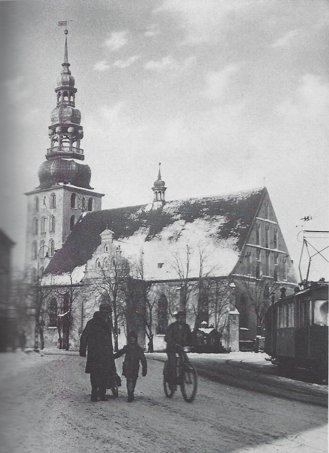 Fotografie der Deutschen Kirche (ab 1933 Deutschordenskirche) in Tilsit